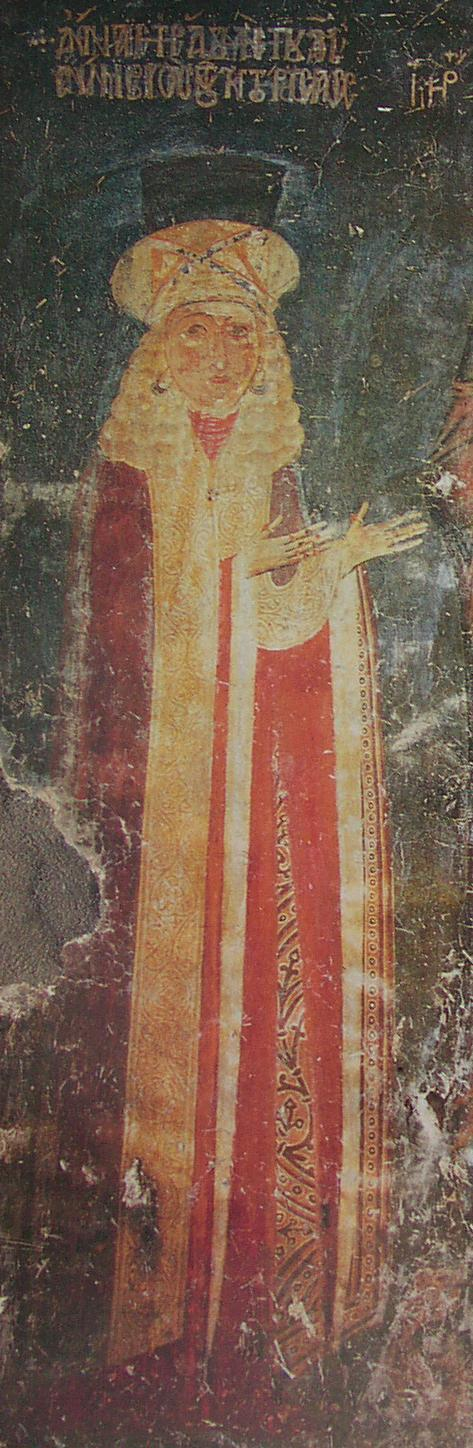 Фреска на ктиторката Ана Радини в църквата "Свети Безсребреници" в Костур.